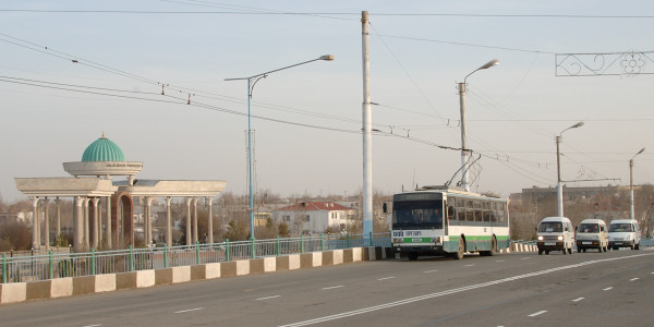 Škoda 14TrM 008 in Urganch